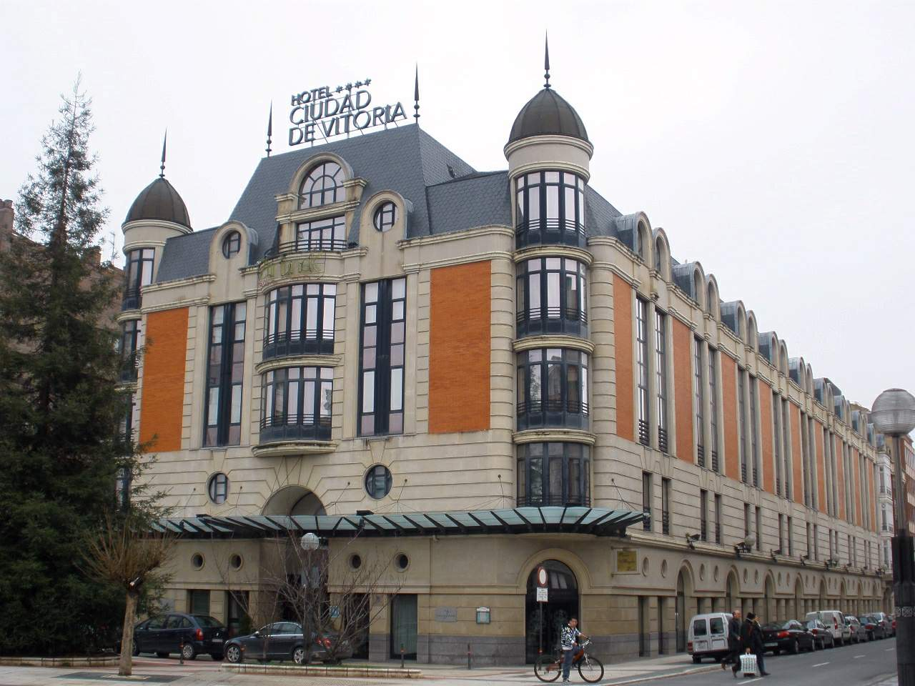 Hotel Silken Ciudad de Vitoria (Vitoria-Gasteiz).